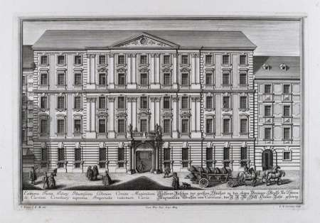 Äusseres Ansehen des großen Haußes in der obern Breuner-Strasse, Tit. Herrn Maximilian Graffen von Cavriani, der K. K. M. Hoff-Camer-Raht, gehörig.